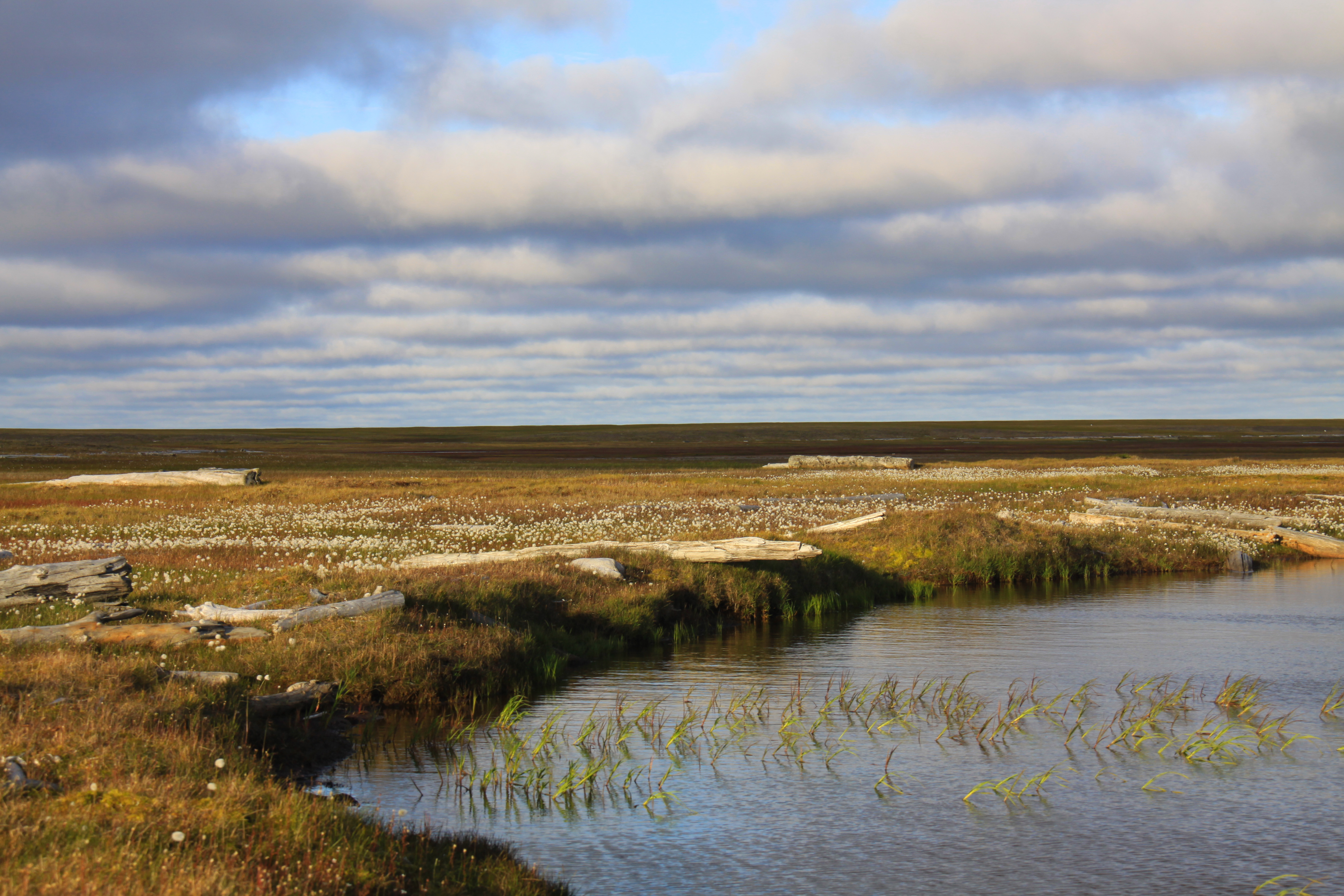 Заповедник Гыданский: Тазовский район, Ямало-Ненецкий автономный округ This image is related to the protected area of Russia number 8900014